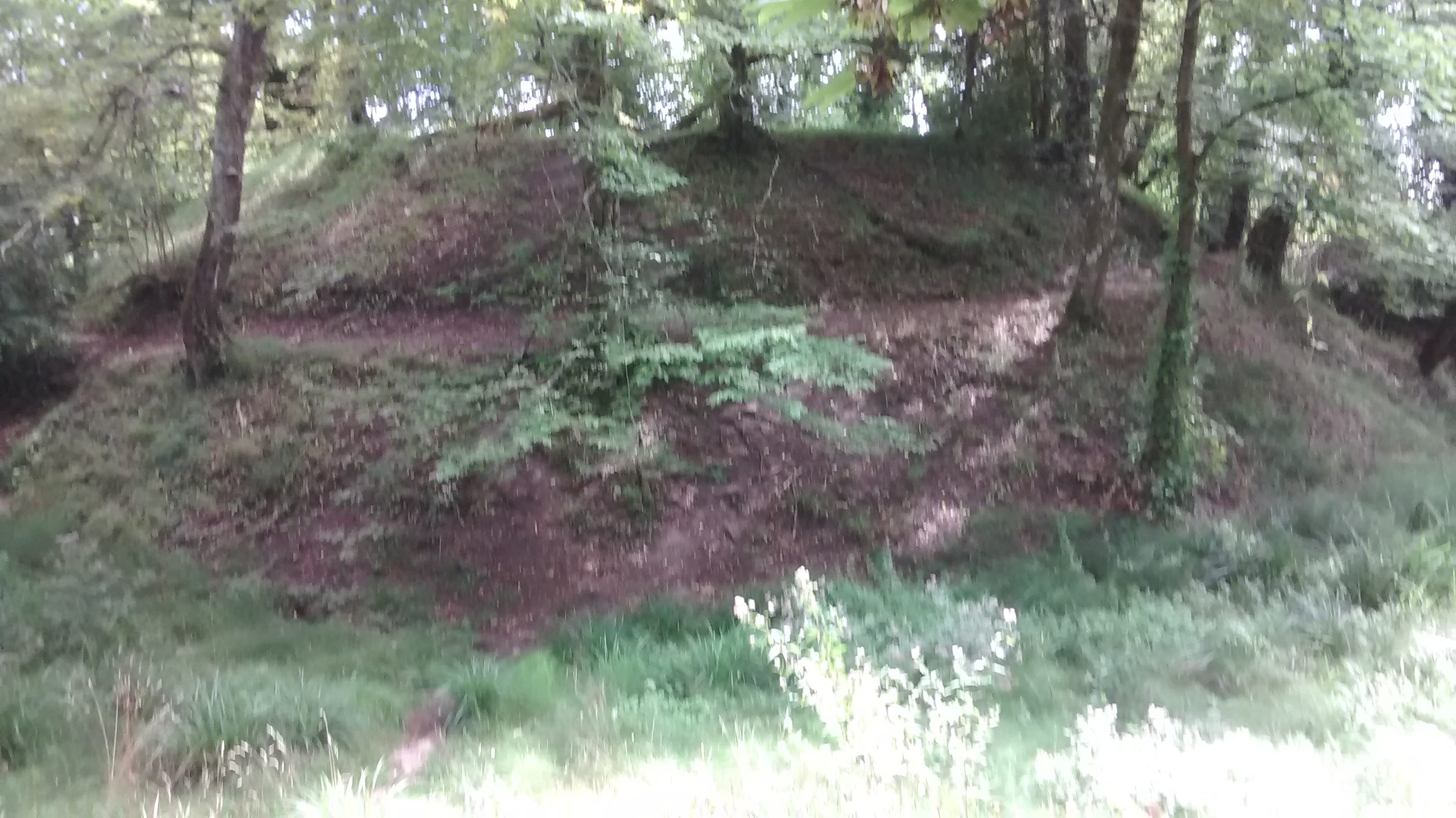 Motte Saint-Albe à Gradignan, 2014